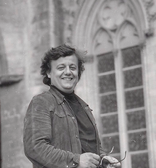 Portraits de Marcel Maréchal par Fernand Michaud. Festival d'Avignon. 1973